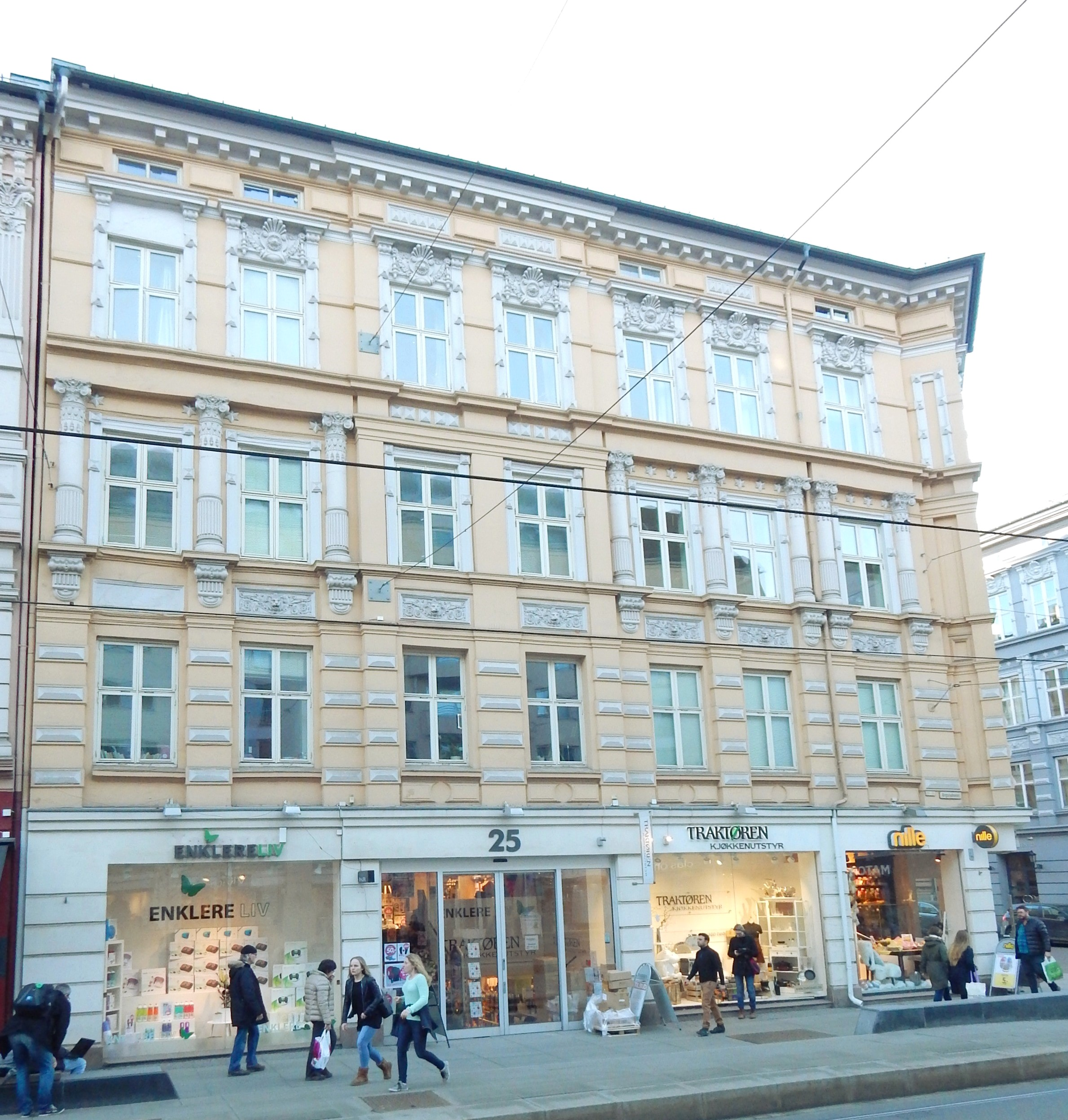 Bogstadveien 25